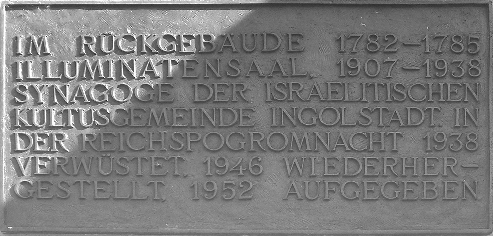 Gedenktafel am Anwesen Theresienstr. 23 in IngolstadtIm rückgebäude 1782-1785Illuminatensaal. 1907-1938Synagoge der Isralitischenkultusgemeinde Ingolstadt. InDer Reichspogromnacht 1938Verwüstet. 1946 wiederher-Gestellt. 1952 aufgeben.